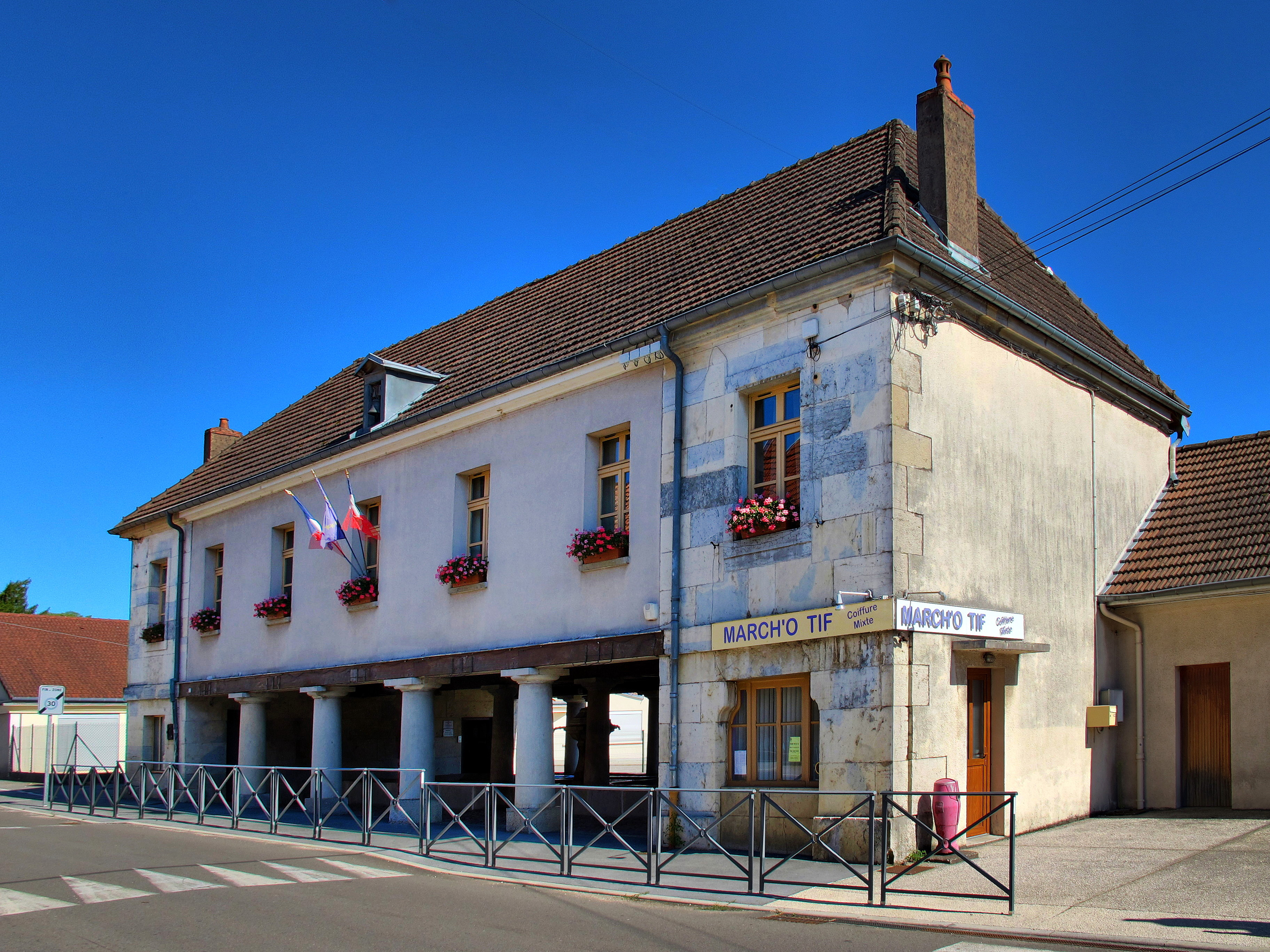 Mairie-lavoir de Marchaux, Doubs, inscrite aux Monuments Historiques